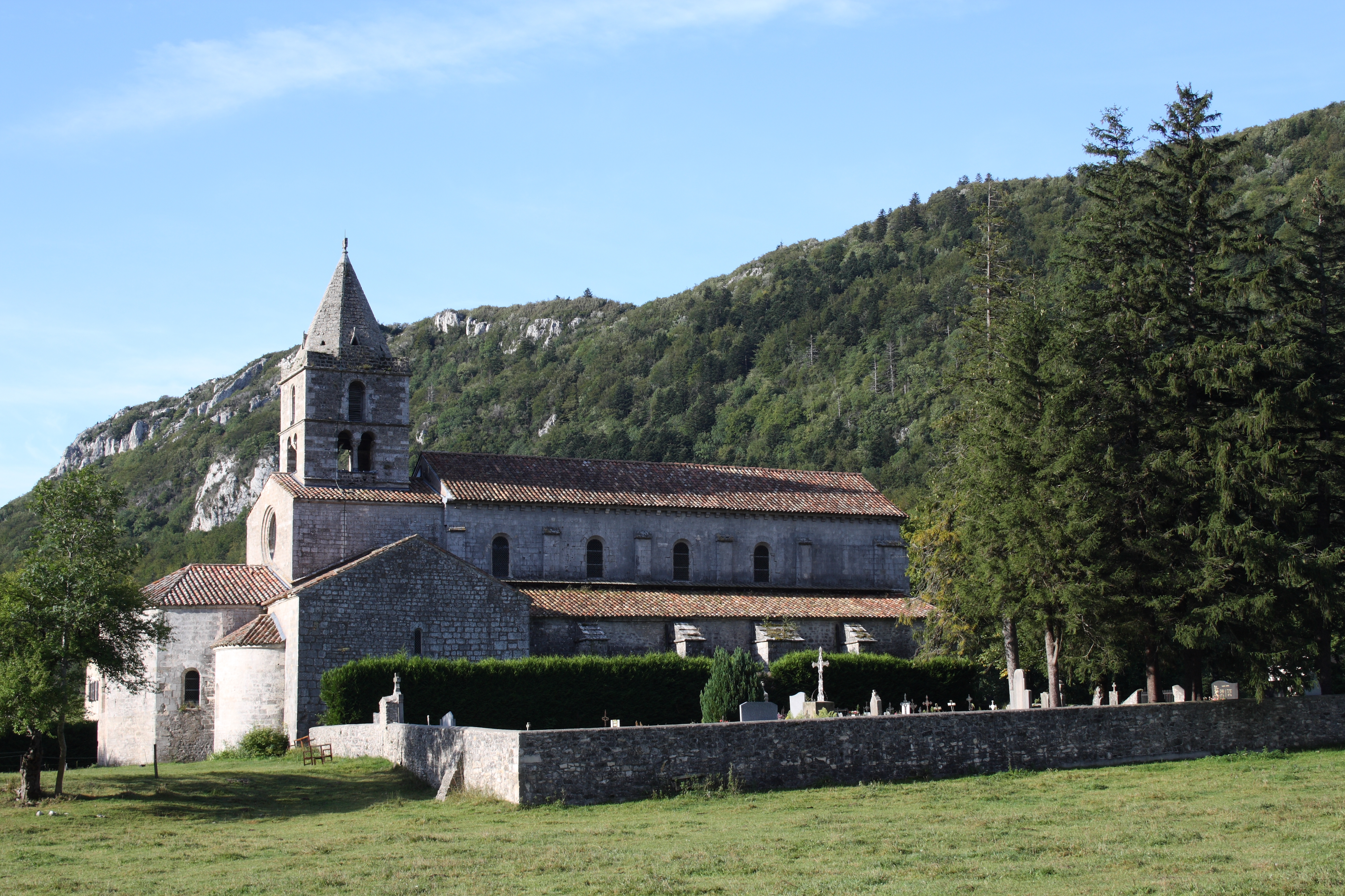 Abtei Sainte-Marie in Léoncel